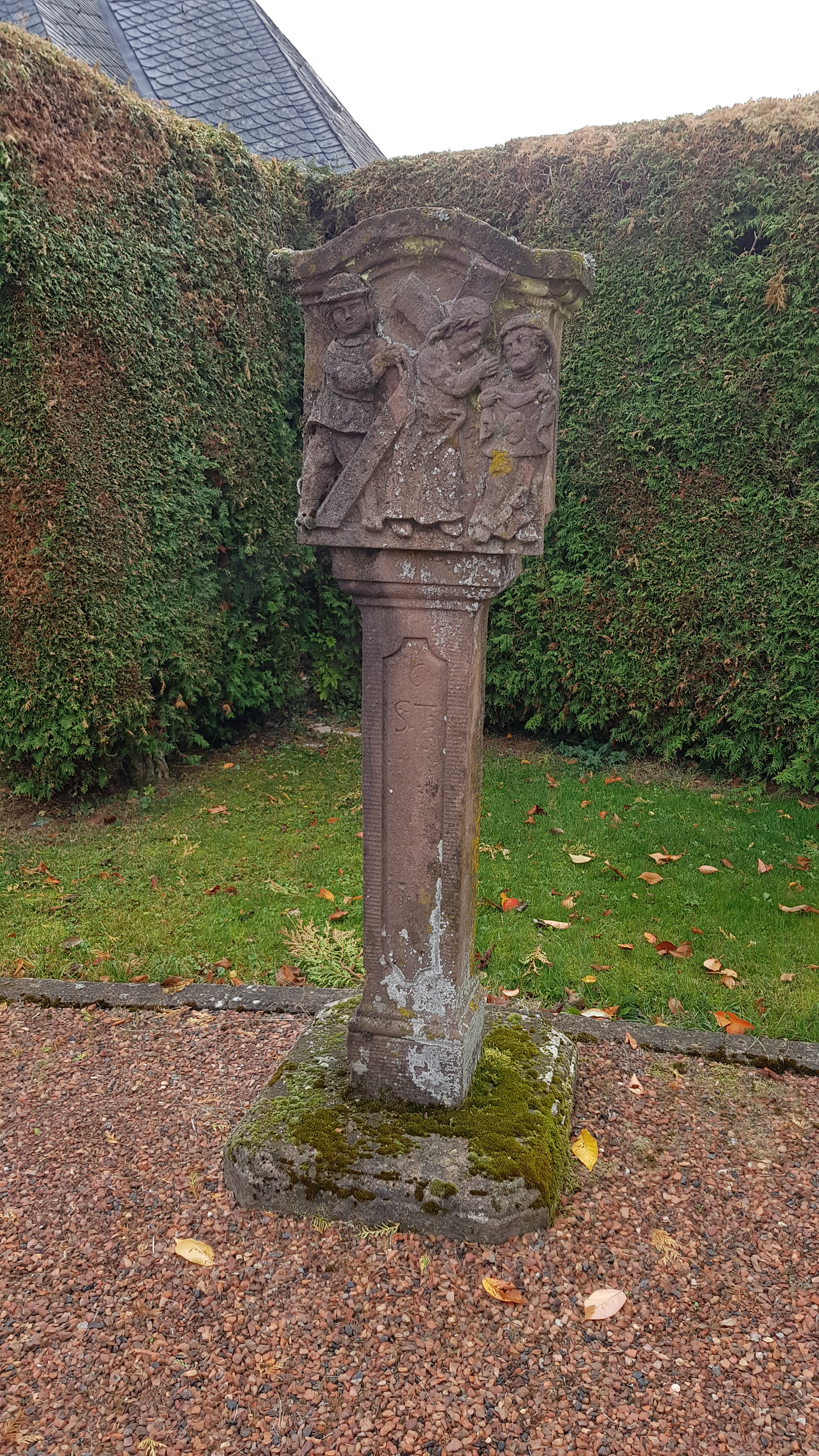 Kreuzweg, Manderfeld, Büllingen, Belgien This photo of immovable heritage has been taken in the Walloon Region